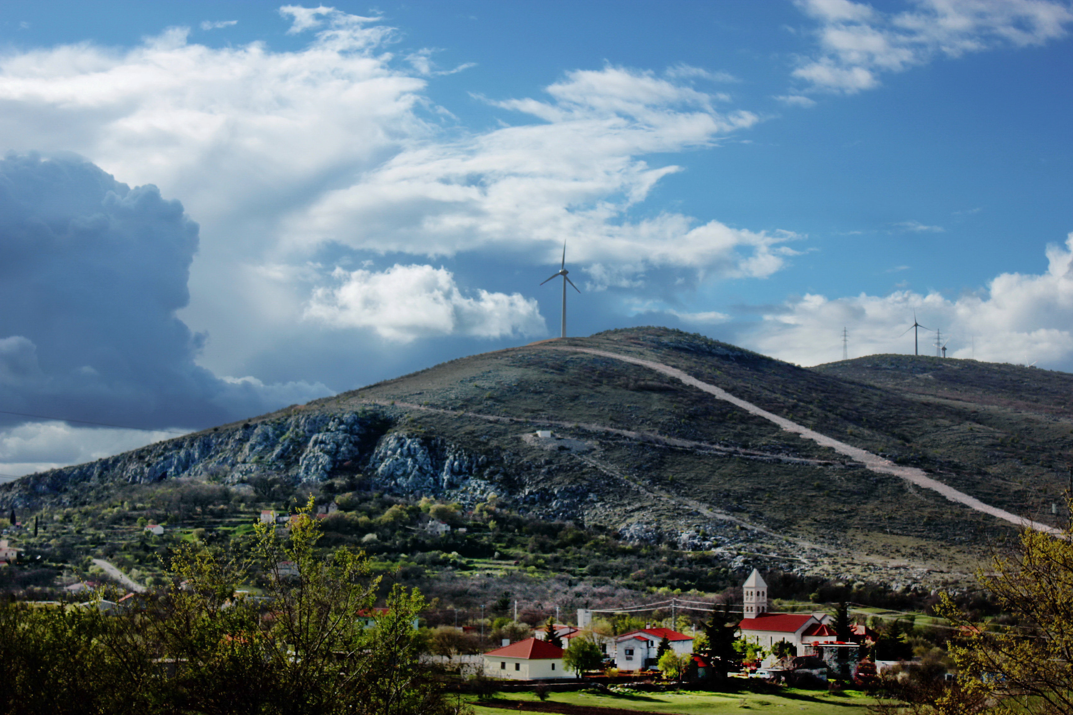 Konjsko (Klis)